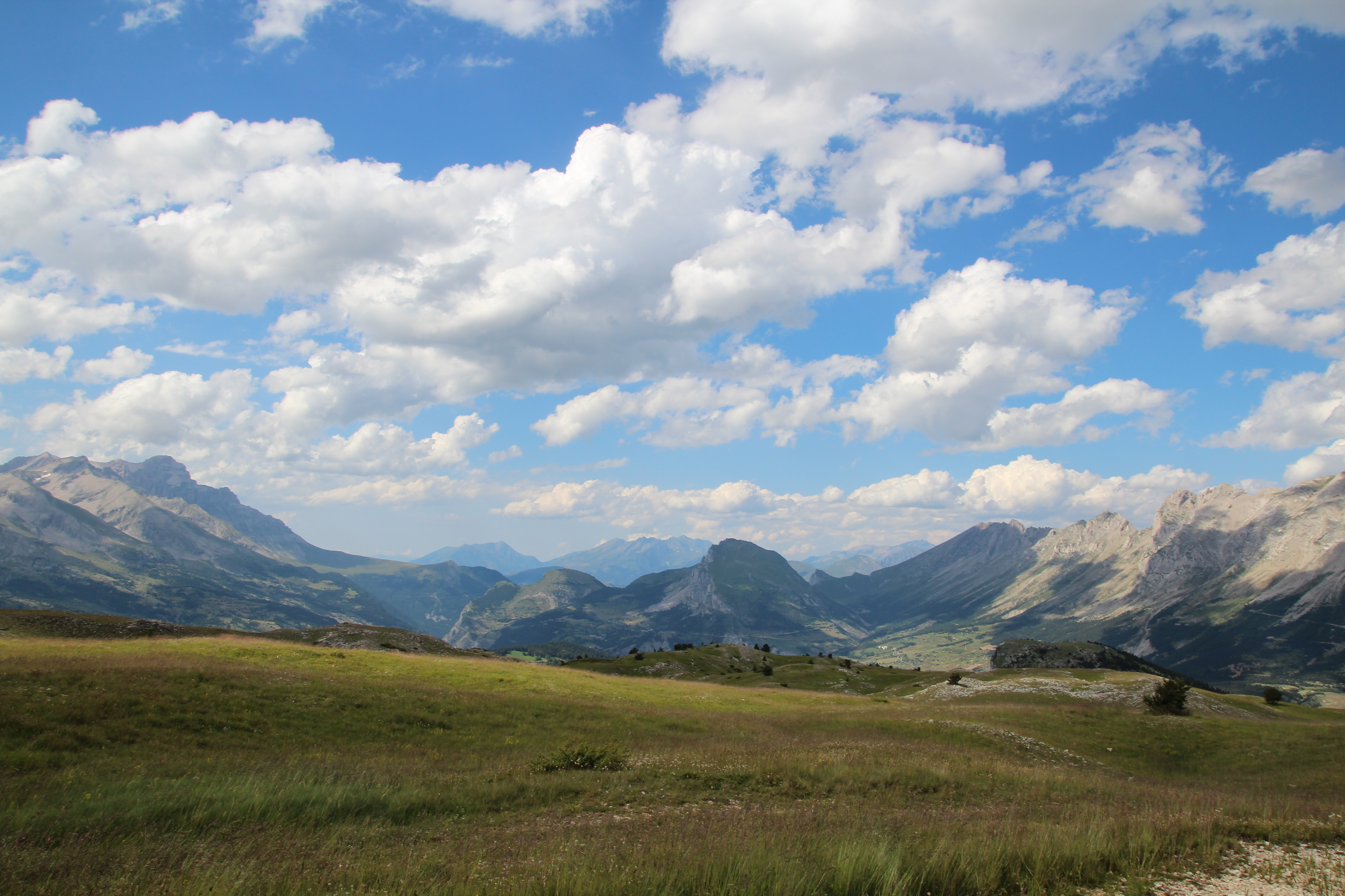 Le Dévoluy - Par Armel@Flickr - Cette photo a été prise le 9 juillet 2012 avec un Canon EOS 600D.